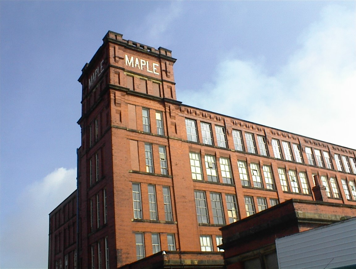 Maple Mill